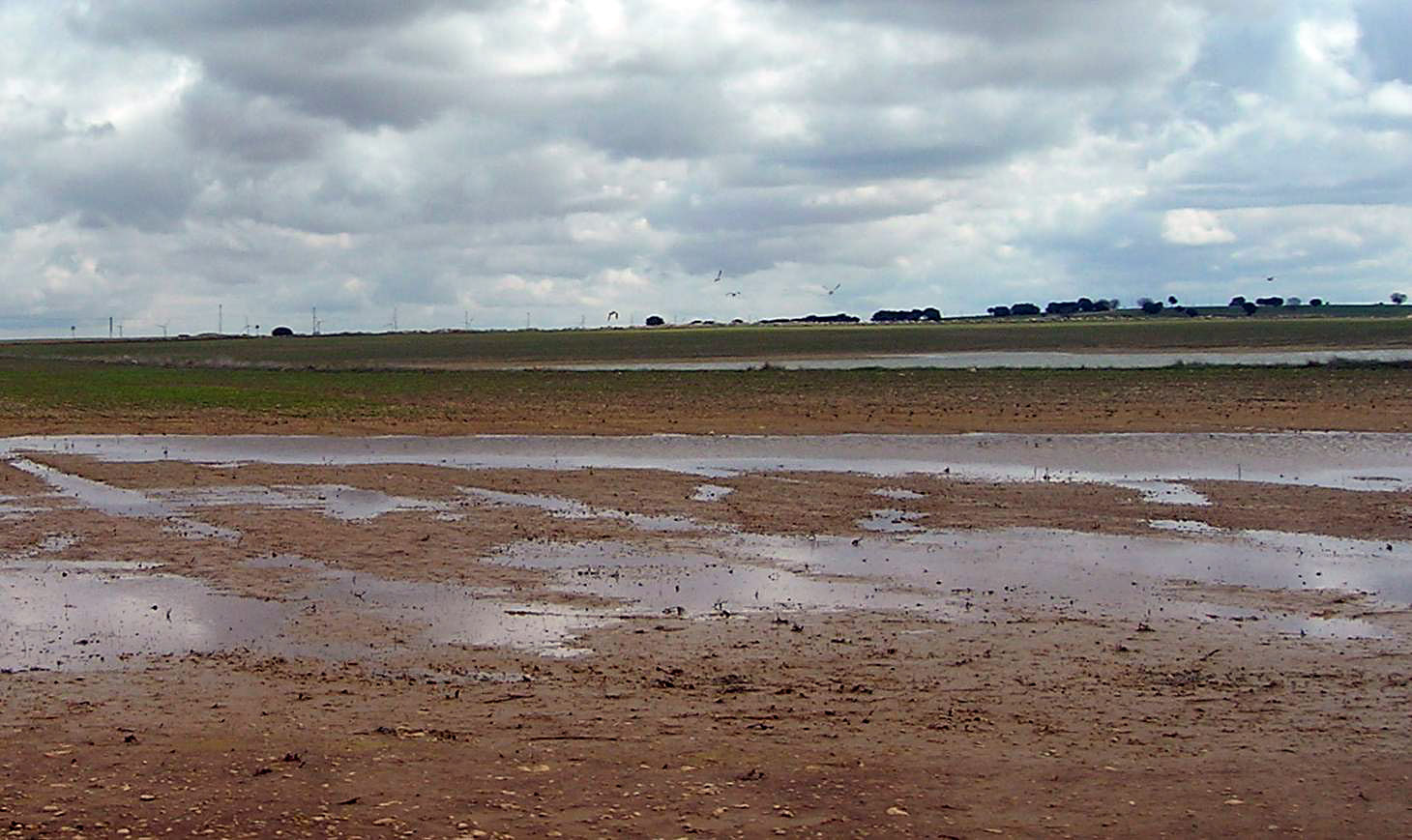 Paisaje sobre la Tabla de La Rabadana (Lagunas de Navalcudia, encharcamientos excepcionales, abril de 2010). La Mancha - España.